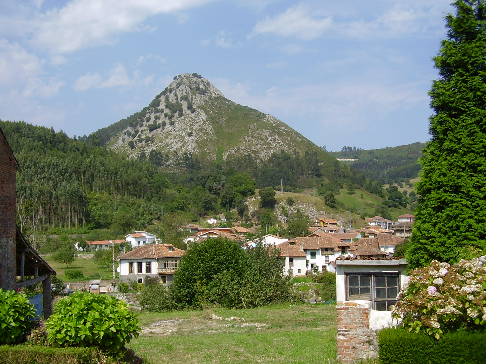 Vista del Pico Castillo, a cuyo pie descansa el pueblo de Rales (Llanes).